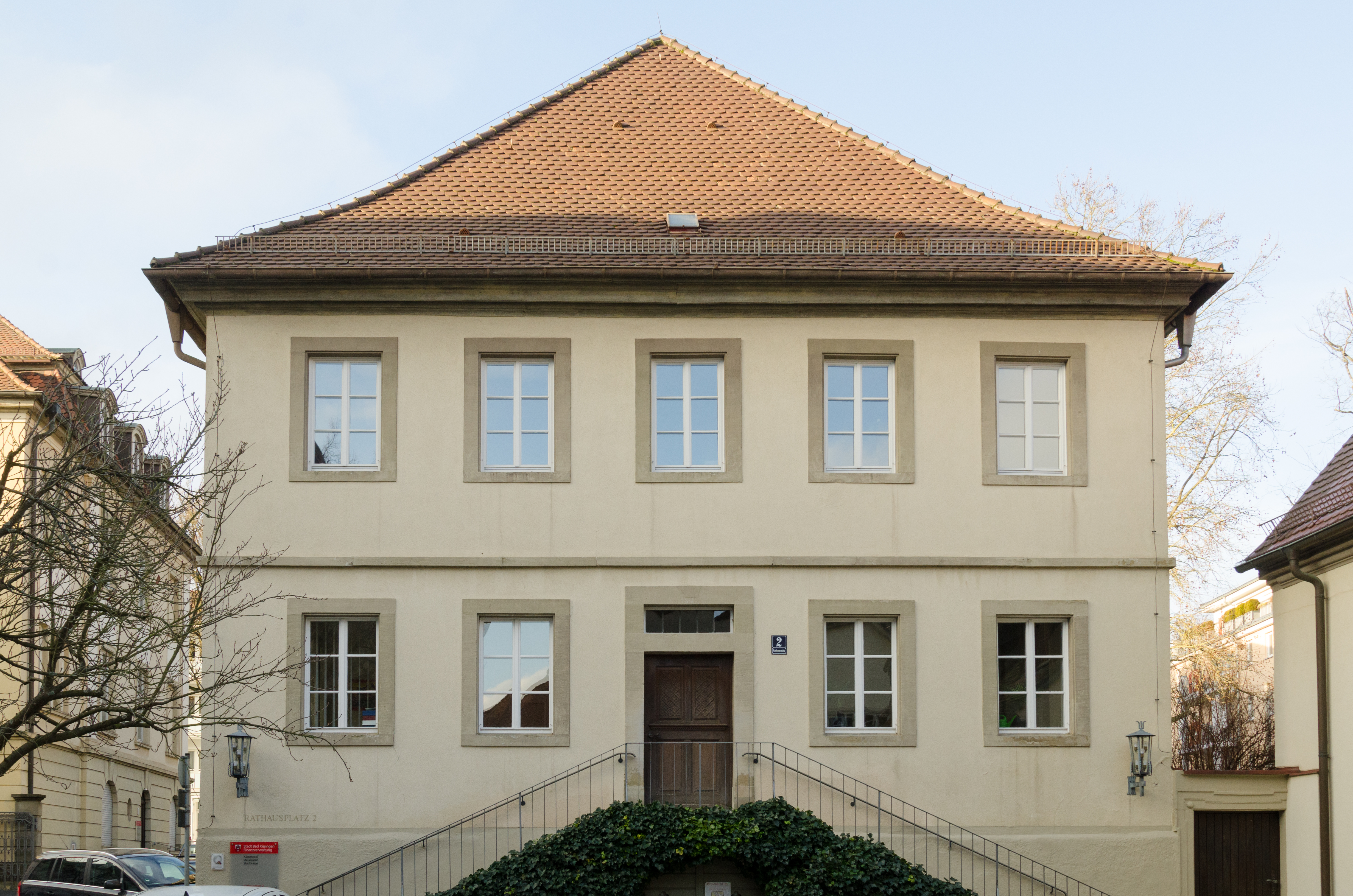 Bad Kissingen, Rathausplatz 2, Pfarrhaus, 2015-01